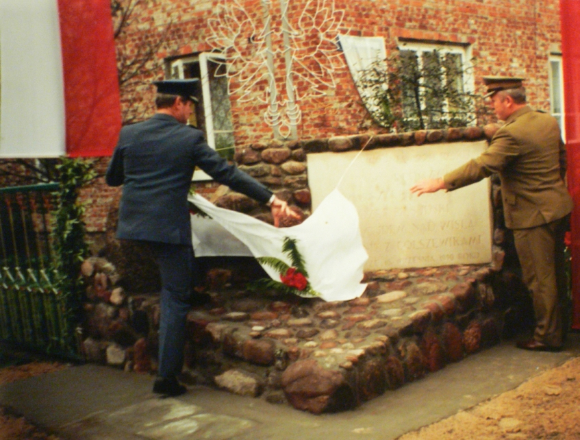 Odsłonięcie pomnika w Zajezierzu dnia 13 sierpnia 1990 roku. Pomnik upamiętnia pobyt Marszałka Polski Józefa Piłsudskiego w Zajezierzu w dniu 13 sierpnia 1920 roku podczas kampanii wojennej w wojnie polsko-bolszewickiej.